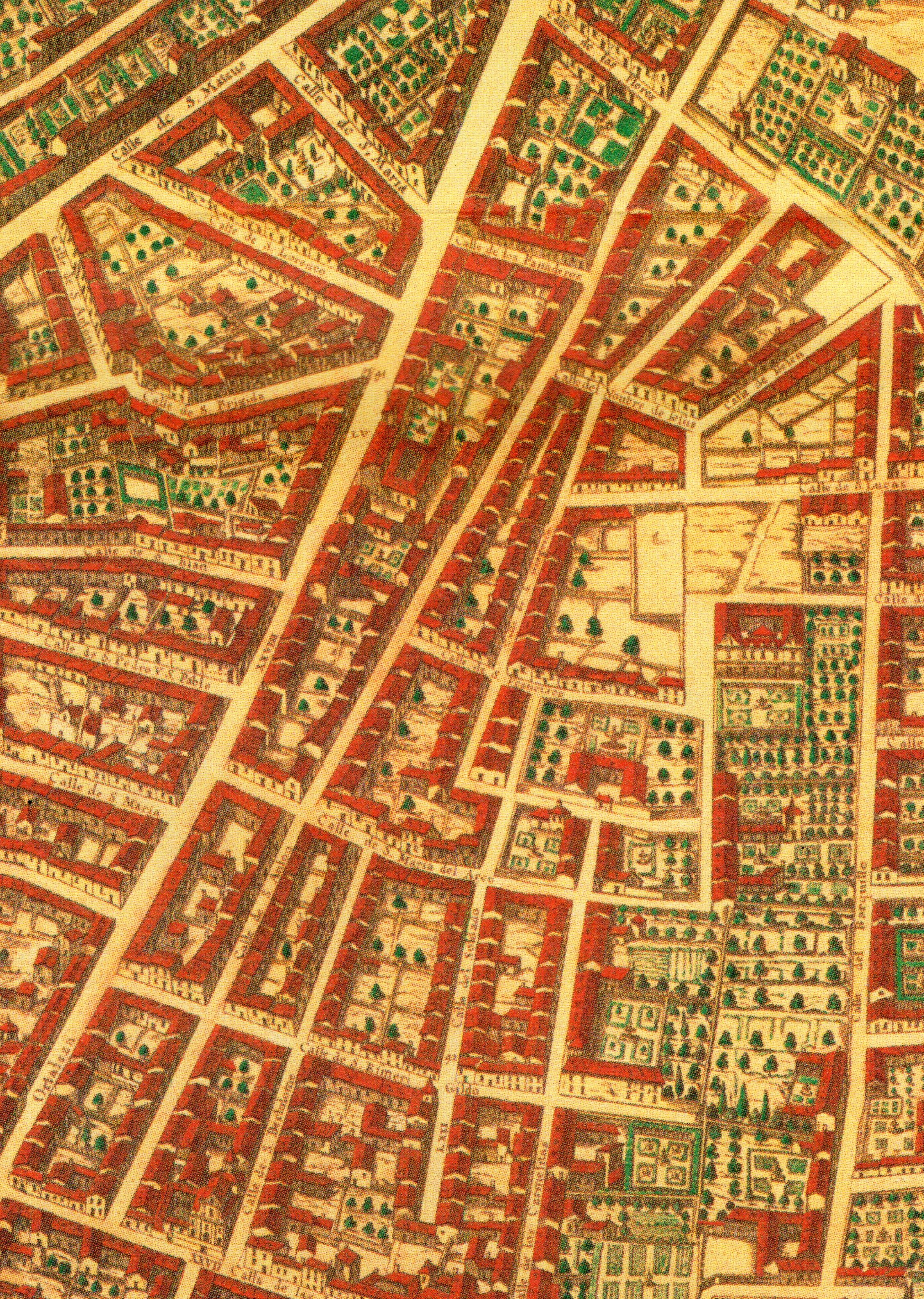 Topografía de la Villa de Madrid descrita por Don Pedro Texeira en 1656, en la cual se demuestran todas las calles al largo y ancho de cada una de ellas, las rinconadas y lo que tuercen las Plazas, fuentes, jardines y huertas con la disposición que tienen las parroquias, Monasterios y Hospitales están señalados sus nombres con letras y números que se hallaran en la tabla y los demás edificios, torres y delanteras de las casas de la parte que mira al Mediodía están sacadas al natural que se podrán tocar las puertas y ventanas de cada una de ellas.